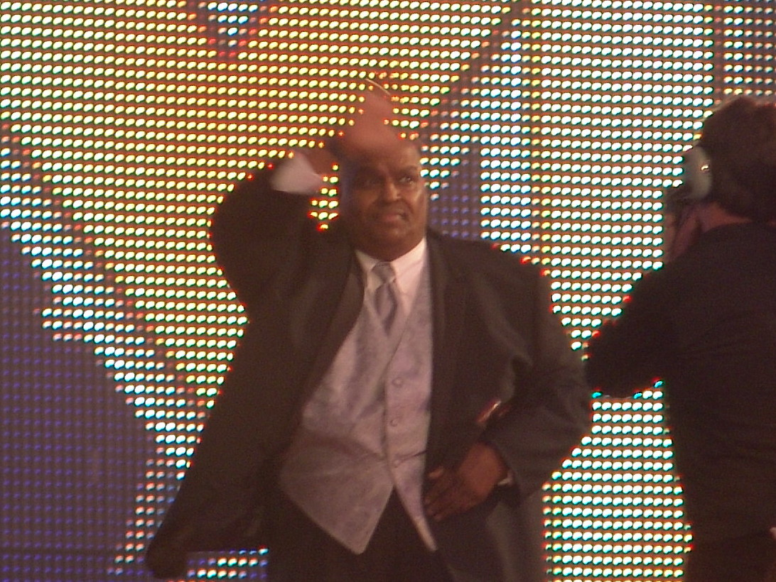 Abdullah en WM